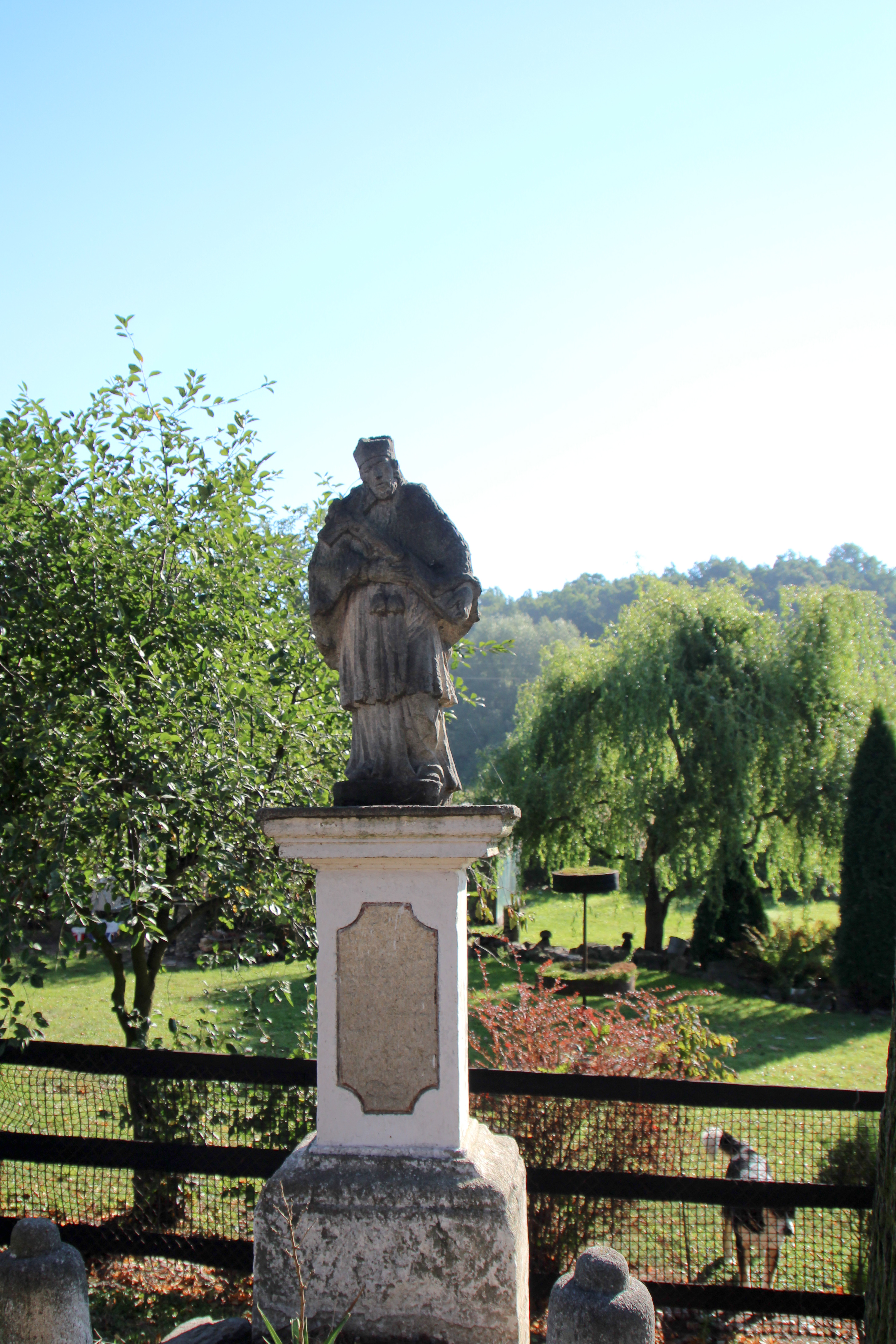 Siestrzechowice – wieś w Polsce położona w województwie opolskim, w powiecie nyskim, w gminie Nysa.